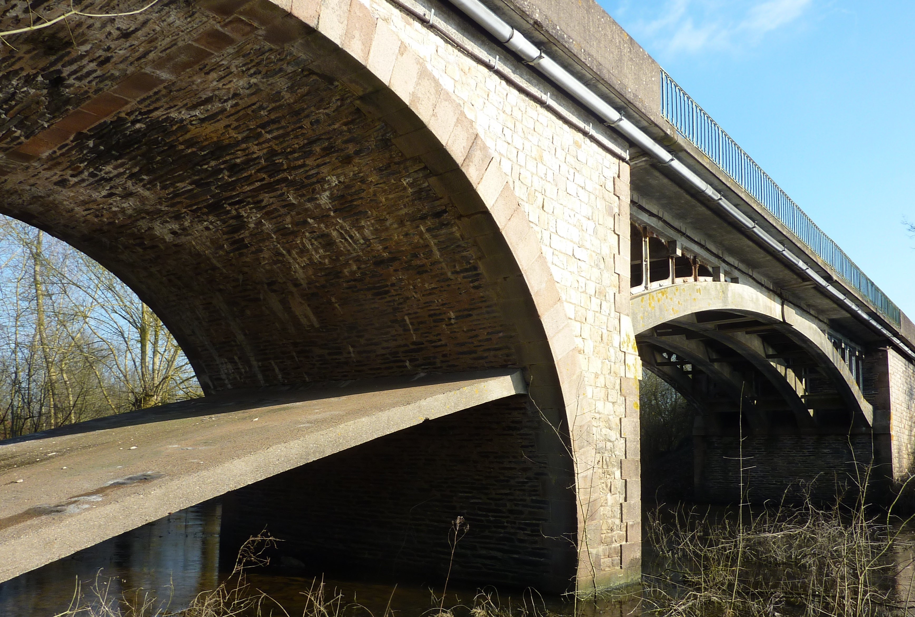 Pont de la Planche à Liré (Maine-et-Loire 49). Vue de la longrine qui transmet les efforts de l'arc en pied de voûte (à gauche, non représenté sur ce cliché)